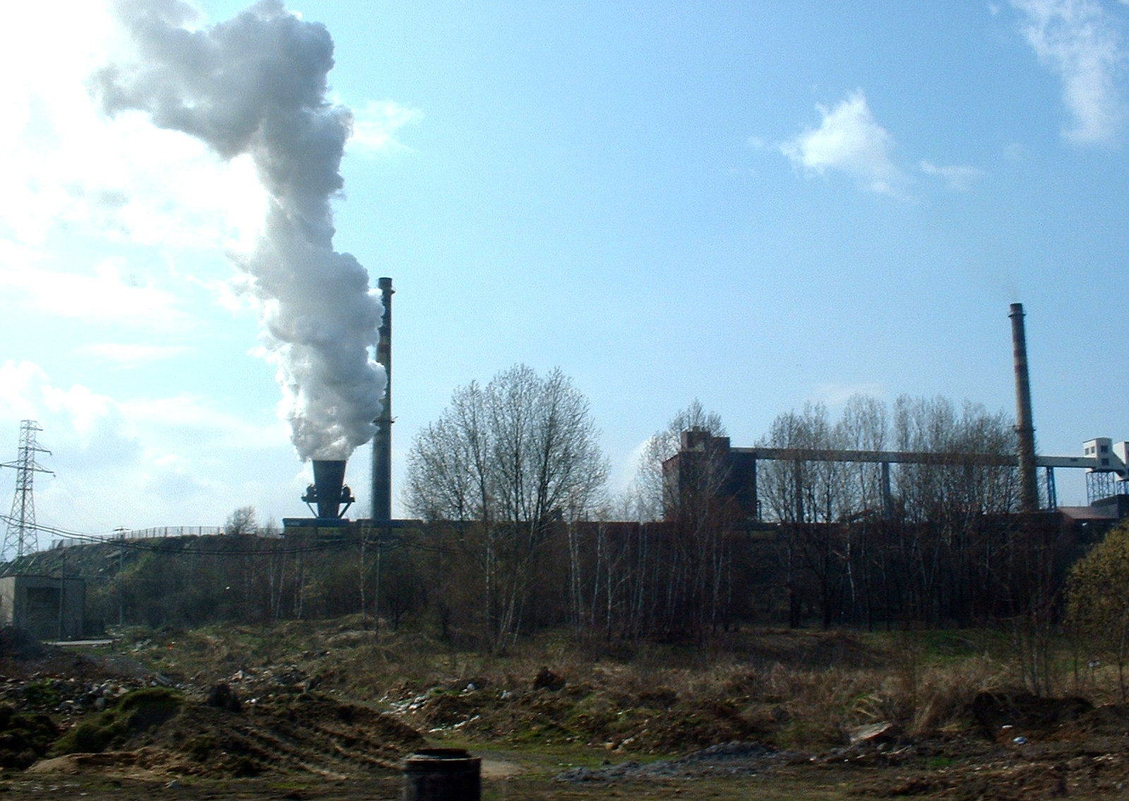 Coke ovens in Radlin, Poland